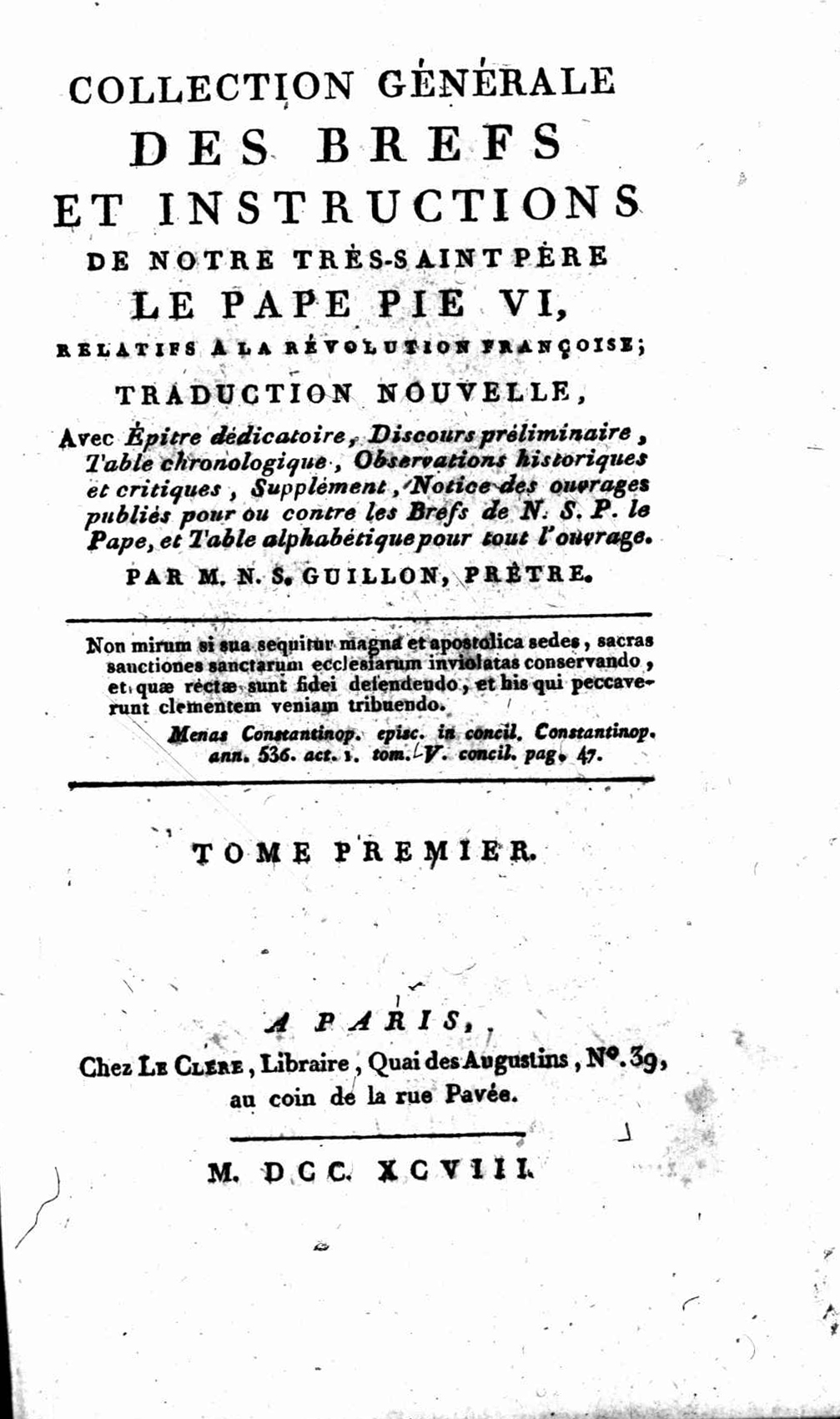 Frontespizio